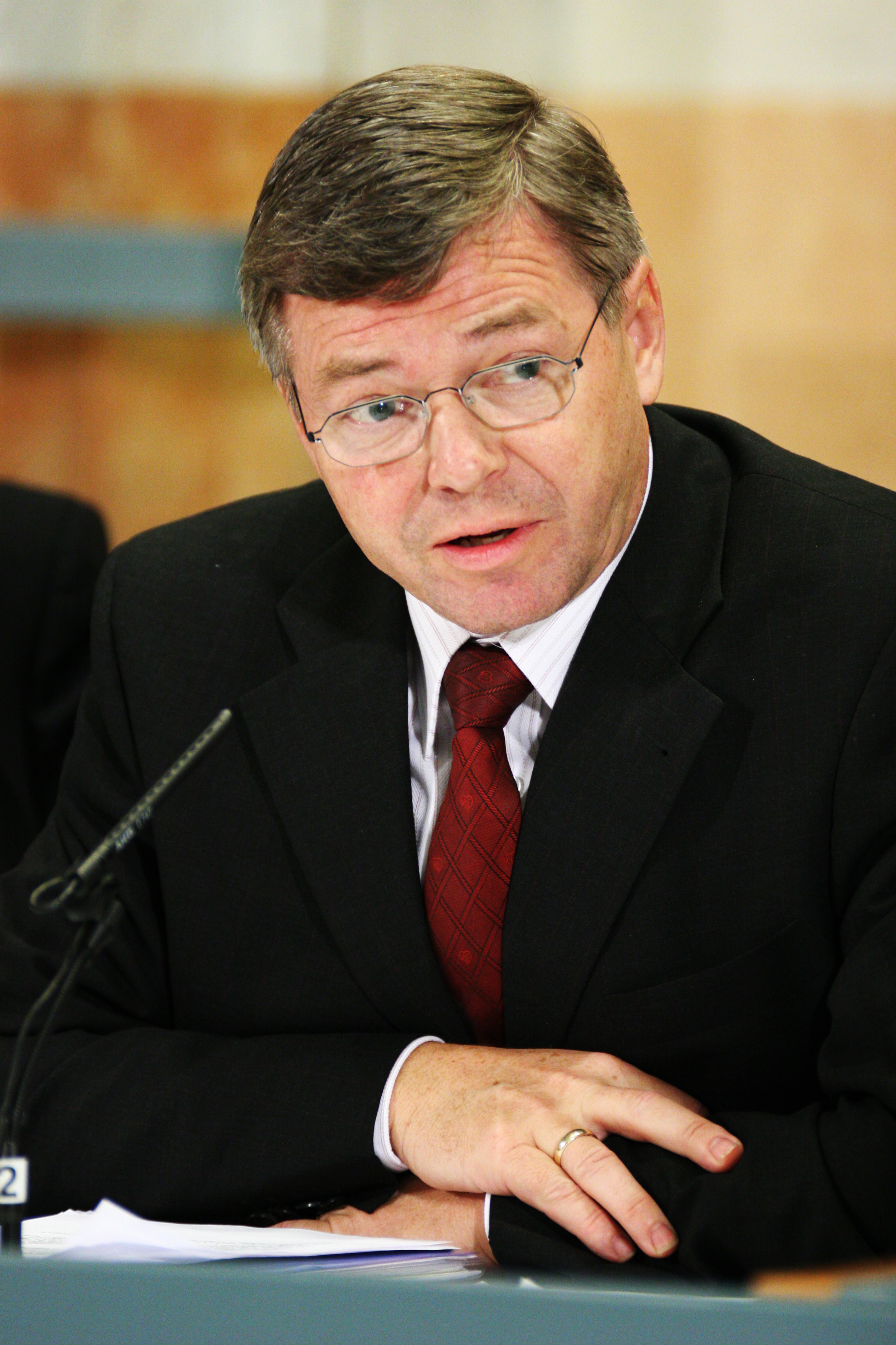 Kjell Magne Bondevik, Norges statsminister, under presskonferens vid Nordiska rådets session i Stockholm.